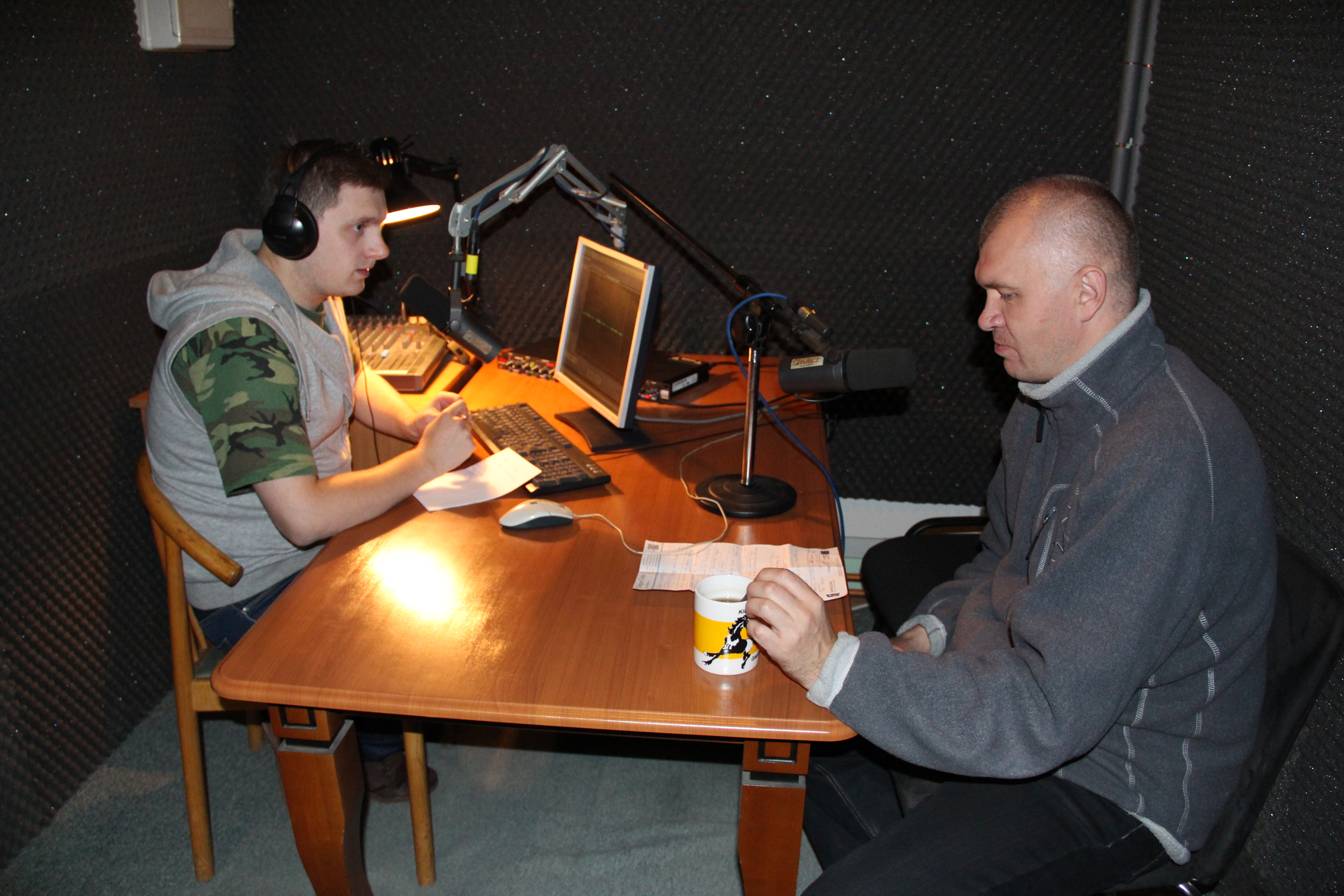 Studio Radia "Racja" w Białymstoku.